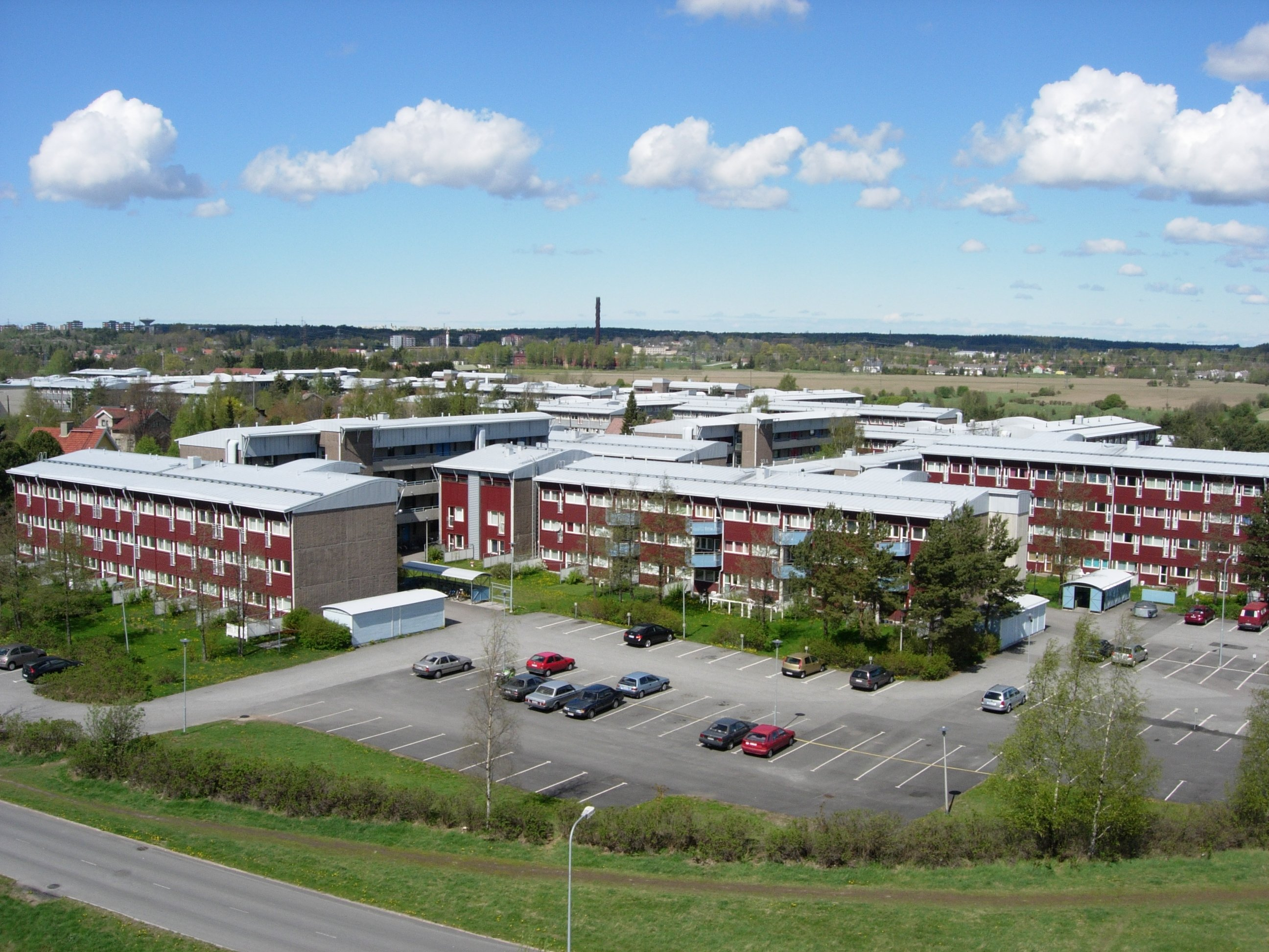 Turun ylioppilaskylä, itäpuoli